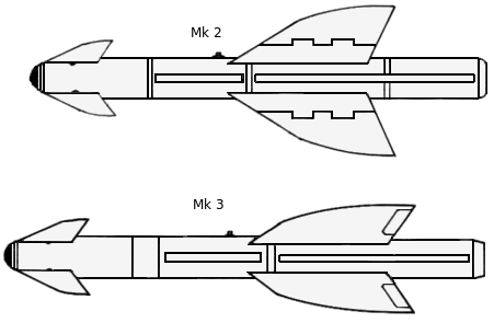 Profile of Penguin missile (US designation : AGM 119) Profil du missile Penguin (Désignation américaine : AGM 119)